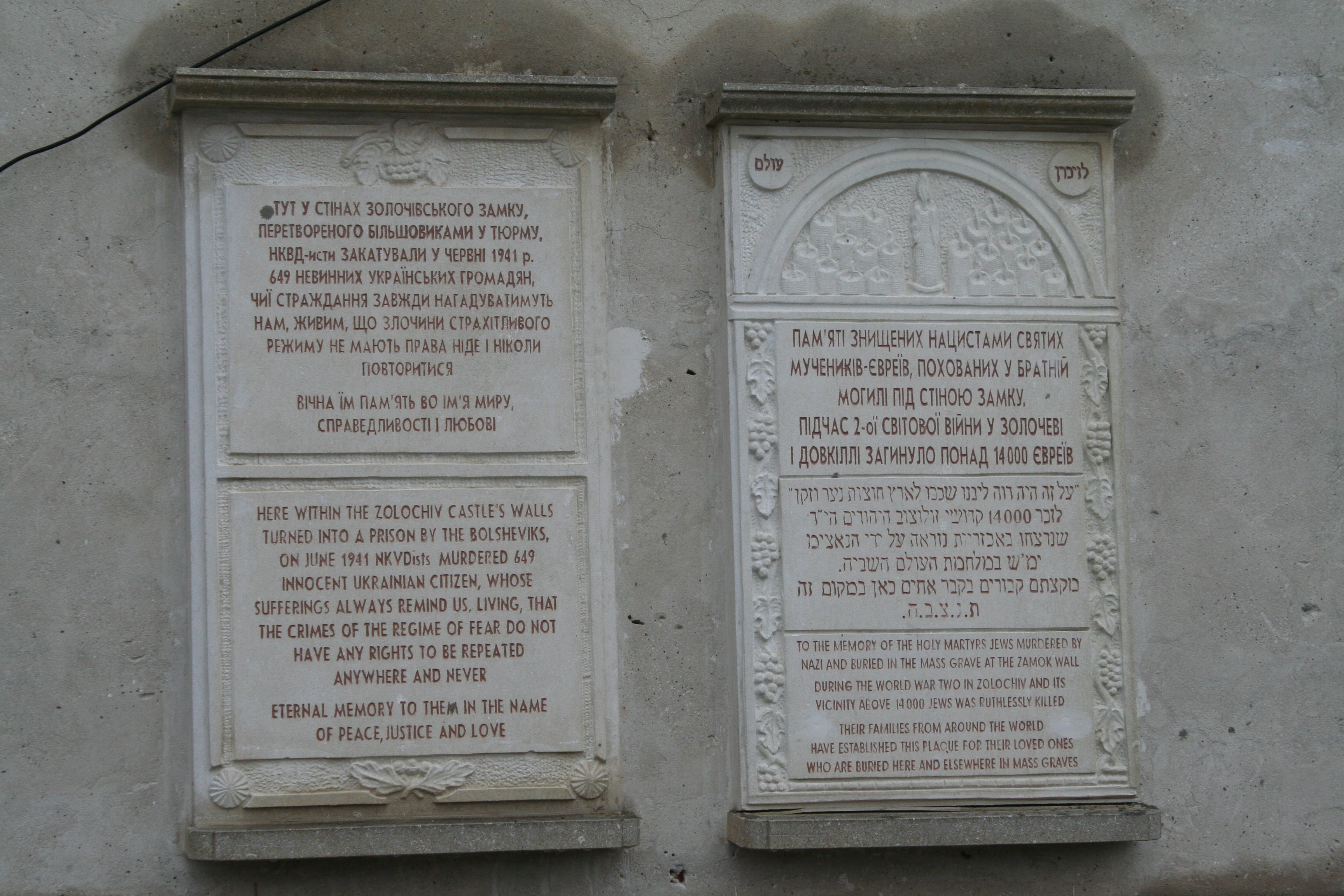 м.Золочів (Львівська область), вул.Тернопільська, 5, Золочівський замок, мемореальна дошка